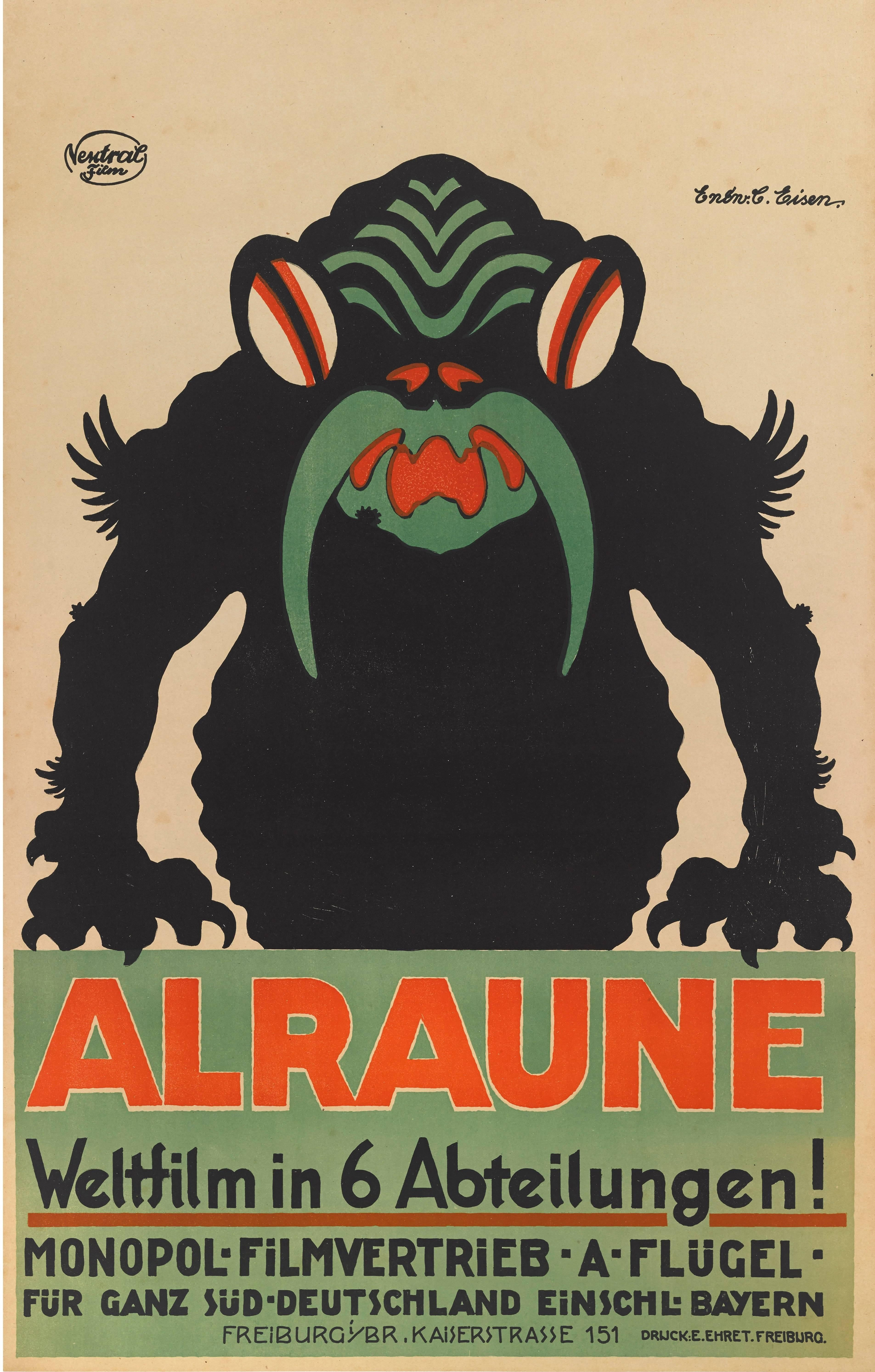 C. Eisen - Alraune. Weltfilm in 6 Abteilungen" (vermutlich Alraune (1918), H 91.44 cm x W 58.42 cm x D 2.54 mm)